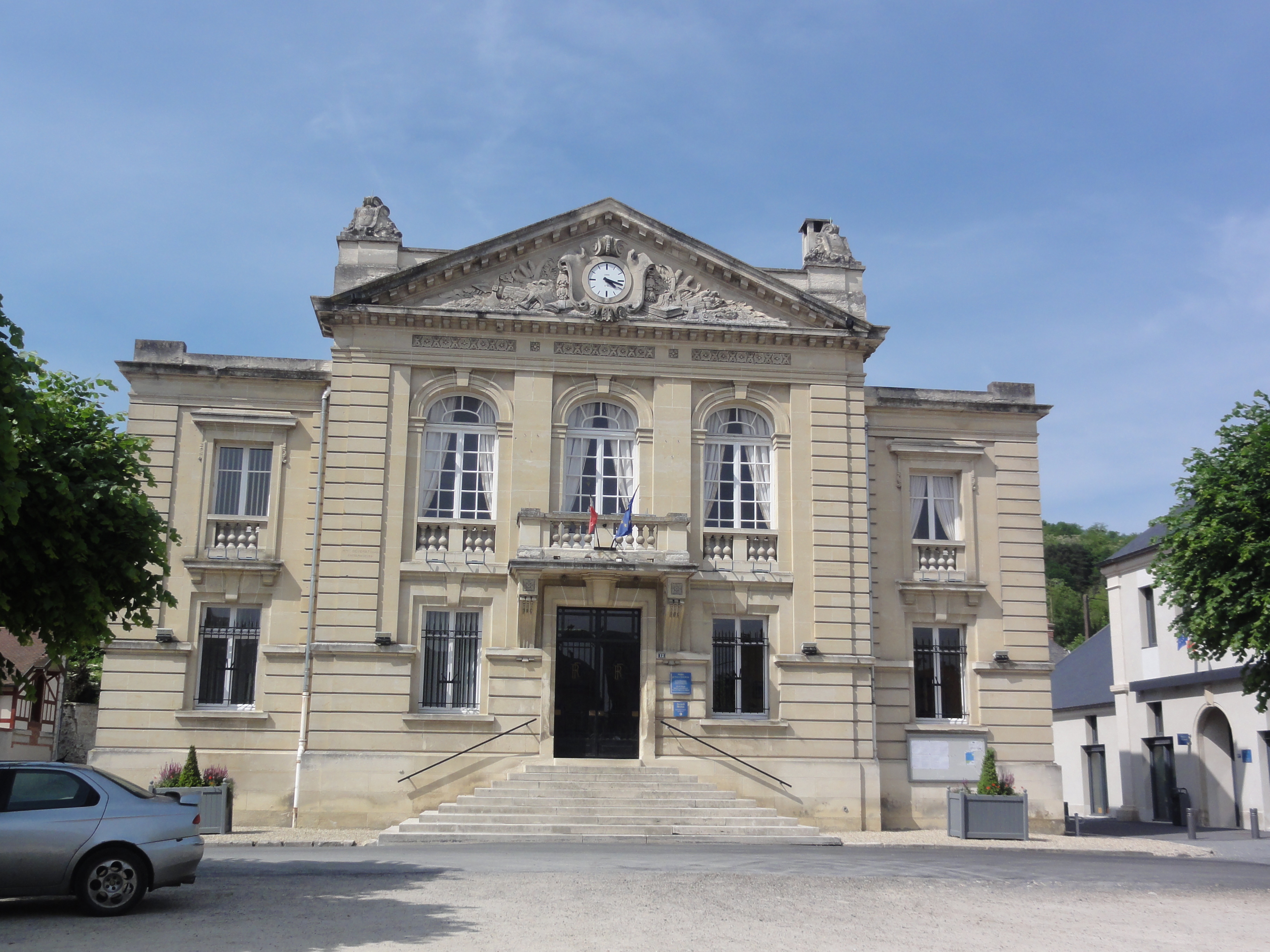 Vailly-sur-Aisne (Aisne) mairie